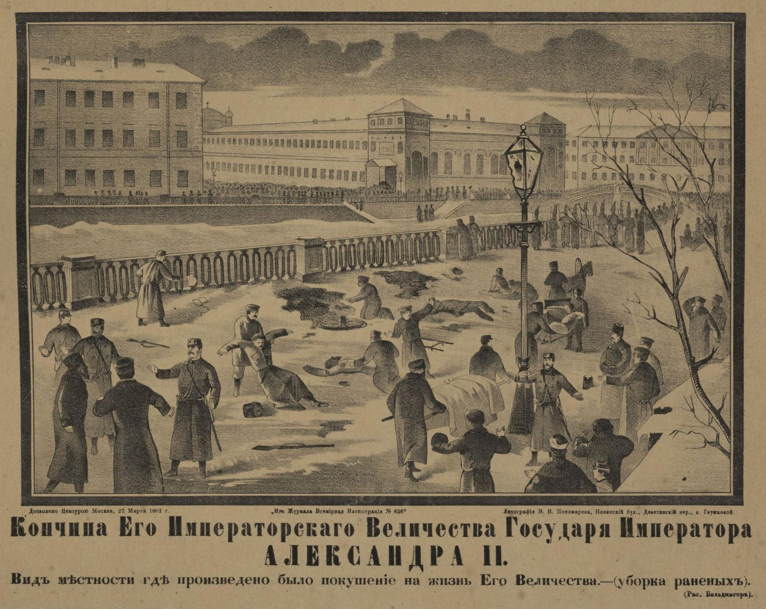 Вид местности, где было произведено покушение на жизнь его величества. Убирают раненых